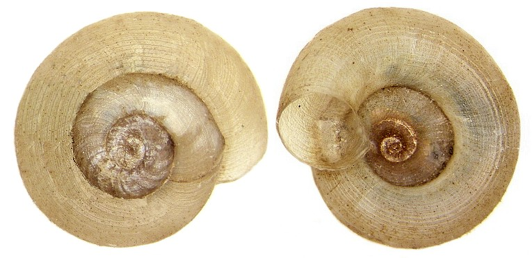 Familie: Planorbidae Grösse: 1,3-1,8 x 4-7 mm Verbreitung: Europa Ökologie: in stehenden und langsam fließenden Gewässern mit viel Pflanzenwuchs Fundort: Germania, Bayern, Oberfranken, Selbitz leg.det. U.Schmidt, 1971 Foto: U.Schmidt, 2007